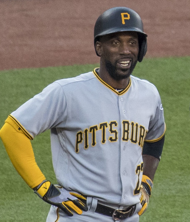 Pirates at Orioles 6/6/17